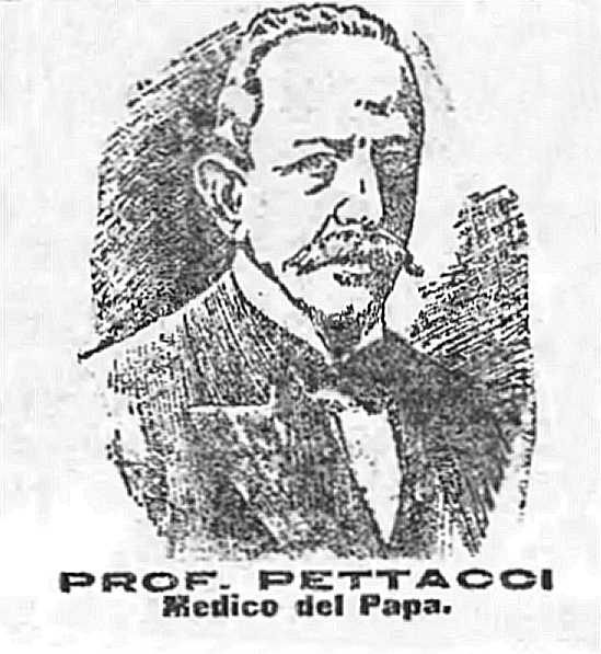 Ritratto del prof. Francesco Saverio Petacci, archiatra pontificio, associato a un articolo pubblicitario del ricostituente "Kola" marca Duitz apparso il 17.1.1914 su il giornale triestino "Il Lavoratore".